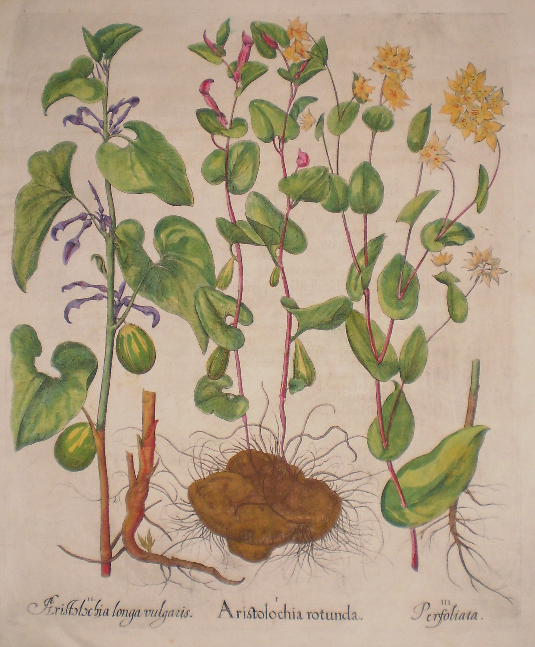 Disegno delle specie Aristolochia longa vulgaris, Aristolochia rotunda, Perfoliata provenienti dell'edizione del 1613 a Norimberga del Celeberrimi Eystettensis. Dall'archivio della Libreria antiquaria Bourlot di Marco Birocco, Torino